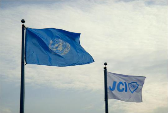 Banderas de la JCI y la ONU